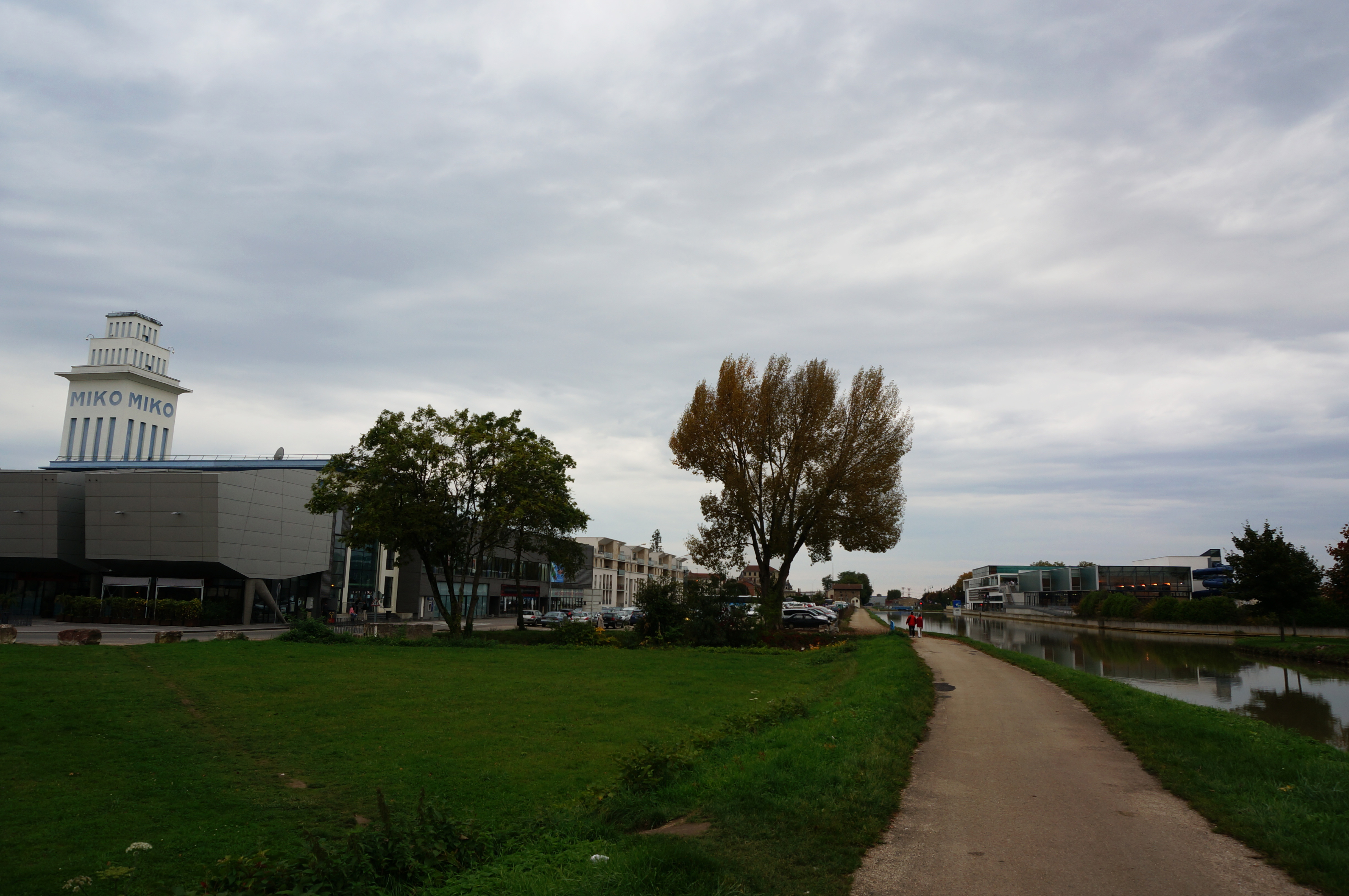 Vue de la piscine .